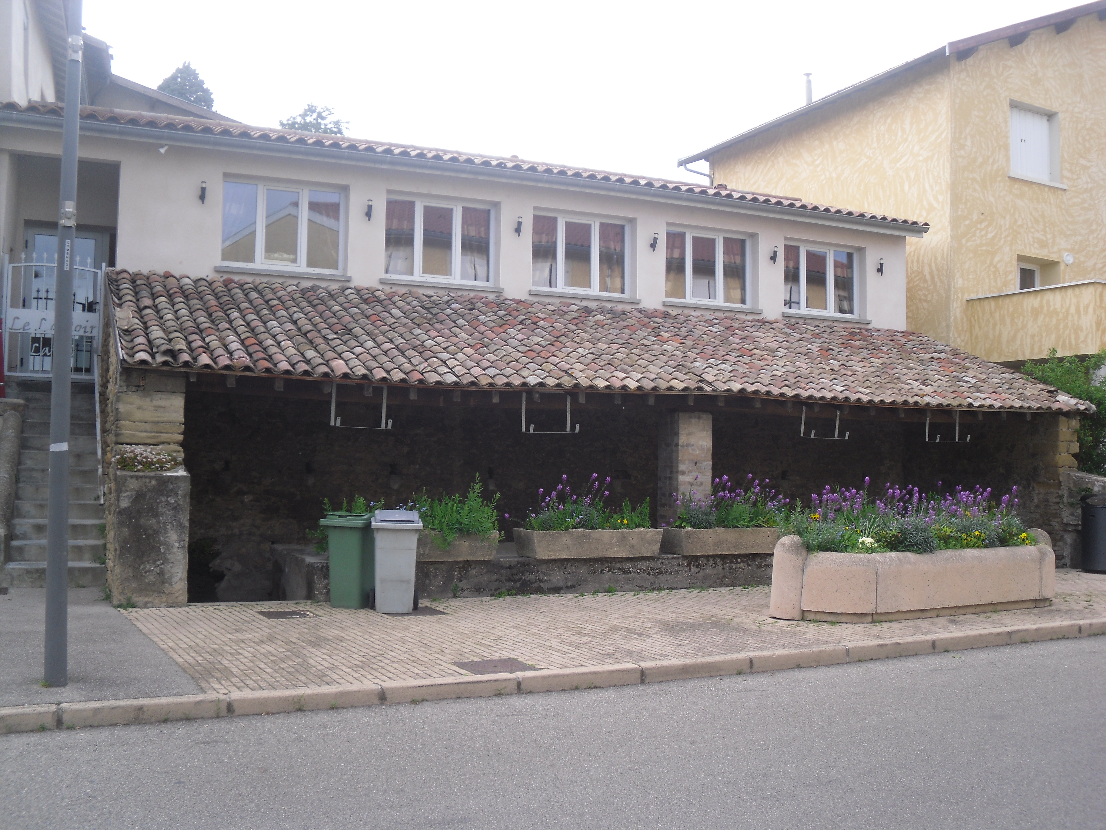 Ancien lavoir du village